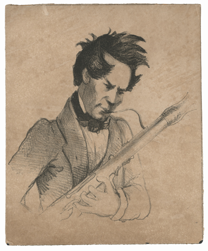 C. Reimers: Das Leipziger Gewandhausorchester im Lichte der Satire, 19 Karikaturen, lithographiert von Blau & Co., Leipzig um 1850 Carl Wilhelm von Inten (1799-1877), Fagottist